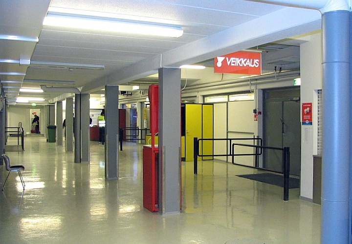 Kisapuiston jäähallin pääaula